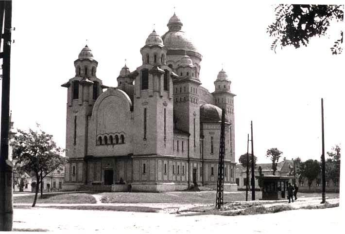 Church in Mehala